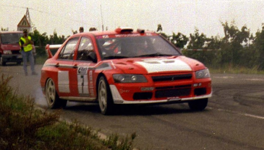 François Delecour, Mitsubishi Lancer WRC, Rallye Deutschland 2002